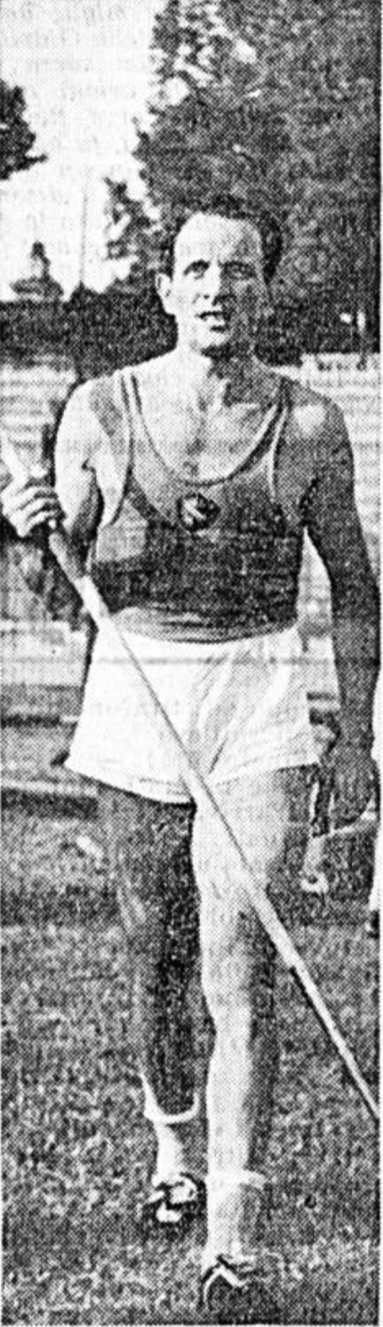 Il giavellottista Amos Matteucci nel 1951.